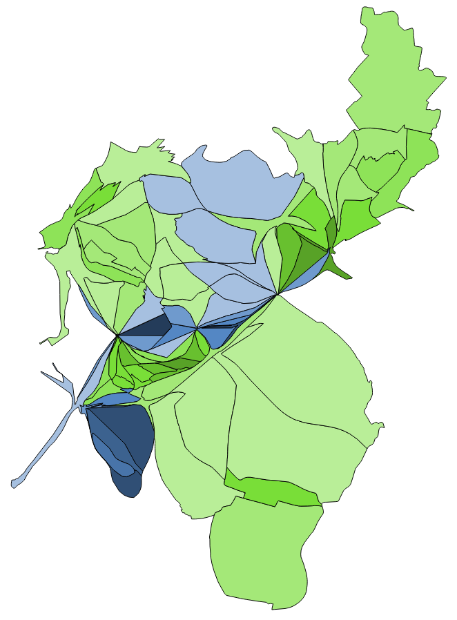 中文（台灣）: 顏色對照表